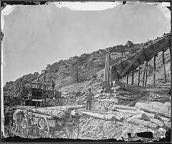 Miners in Eureka, Nevada working beside an ore chute.